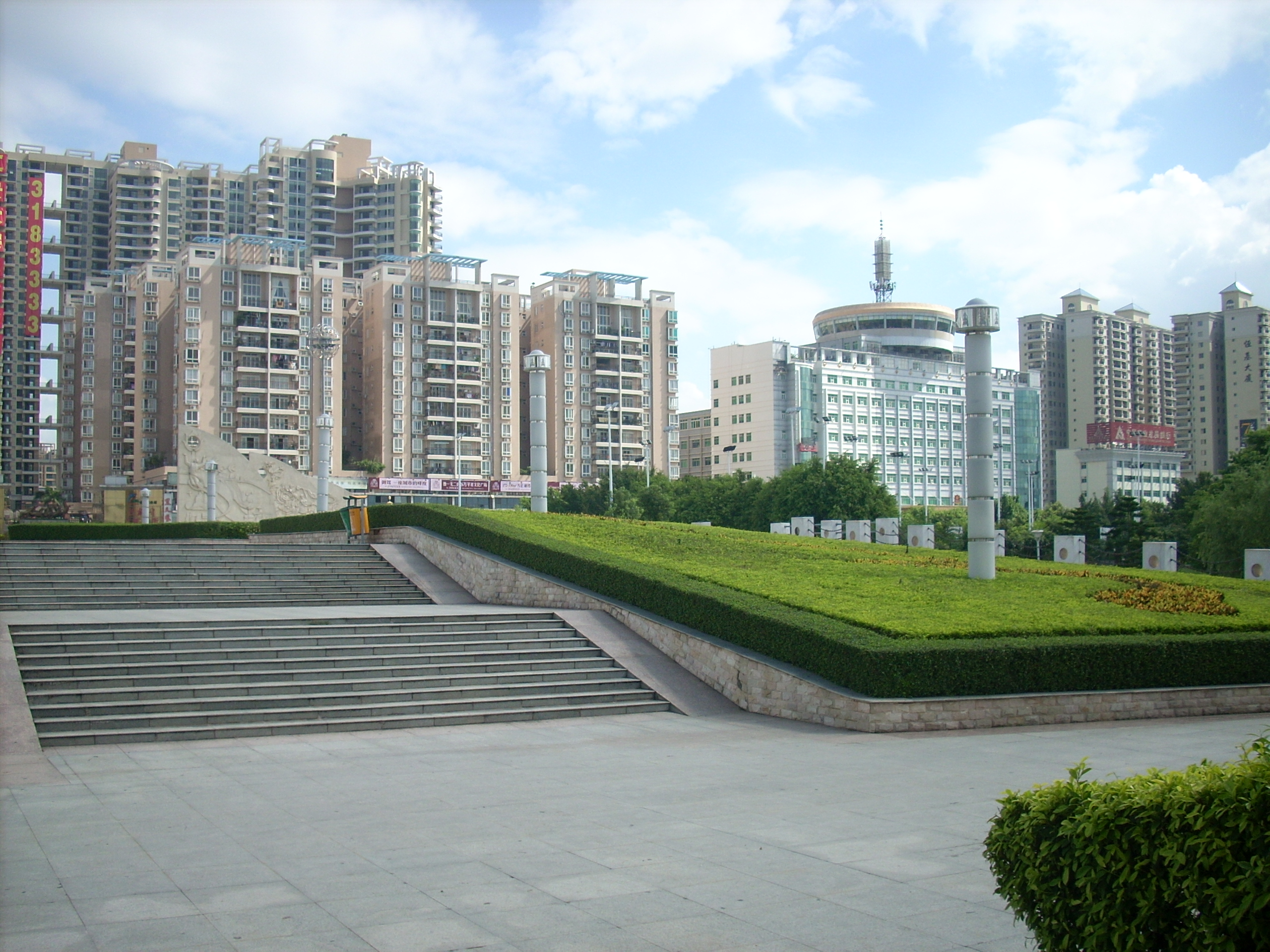 沿江东住宅圈